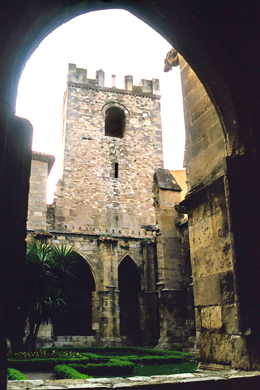 France - Languedoc - Aude - Narbonne - Clocher de Théodard